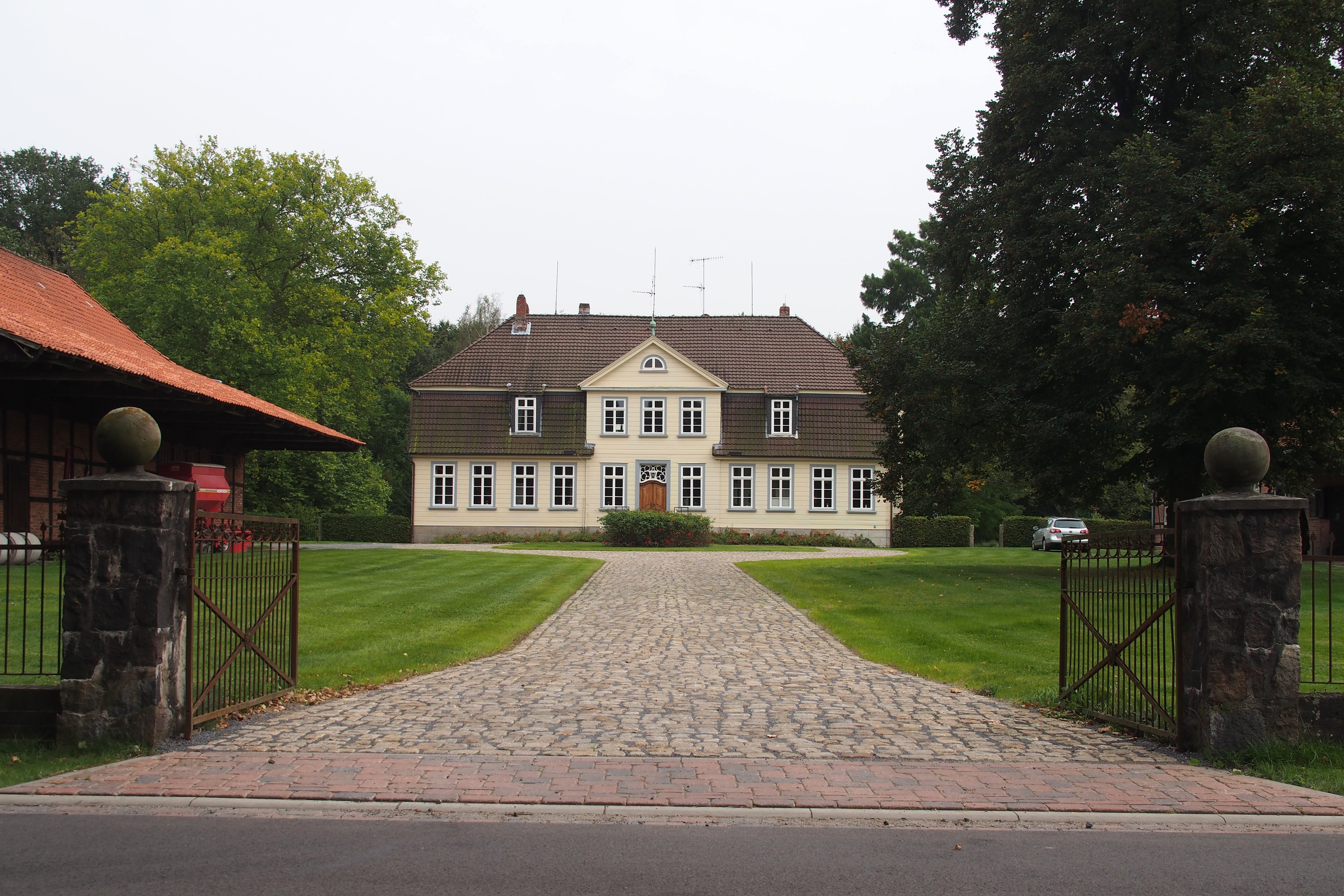 Südgut in Eldingen Ortsteil Hohnhorst, Niedersachsen (Germany)